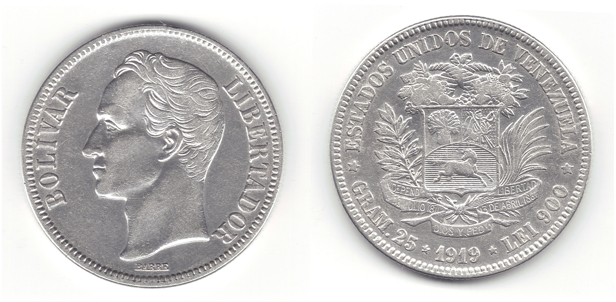 Moneda venezolana de 5 Bolívares de plata, llamada popularmente Fuerte, derivado a su valor 1 Peso Fuerte; de fecha 1919. Esta denominación es equivalente en valor a 1 Venezolano, 1 Peso Fuerte, 1,25 Pesos y 10 Reales (de la unidad monetaria Peso Fuerte) Fecha: 1919 General: Forma circular, canto estríado contínuo. Anverso (izq): Ribete circular, gráfila dentada. En el centro, sobre el campo, efigie de Simón Bolívar mirando a la izquierda con "BARRE" (del grabador original Barre) en su base, circulada con "BOLÍVAR" a la izquierda y "LIBERTADOR" a la derecha. Reverso (der): Ribete circular, gráfila dentada. En el centro, sobre el campo, Escudo Nacional con las leyendas "INDEPENDENcia", "LIBERTAD", "5 DE JULIO DE 1811", "13 DE ABRIL DE 1864" y "DIOS Y FEDcion". A lo largo del borde la leyenda "ESTADOS UNIDOS DE VENEZUELA", el peso "GRAM.25", el año y la pureza metálica "LEI 900". Similitudes del diseño del reverso: El diseño es similar al Diseño A, Tipo A, variando en el cambio de una de las cintas a "13 de Abril de 1864" en el Escudo Nacional. Observaciones: Existe discrepancia en la precisión de la cantidad de acuñaciones ocurridas en 1903.